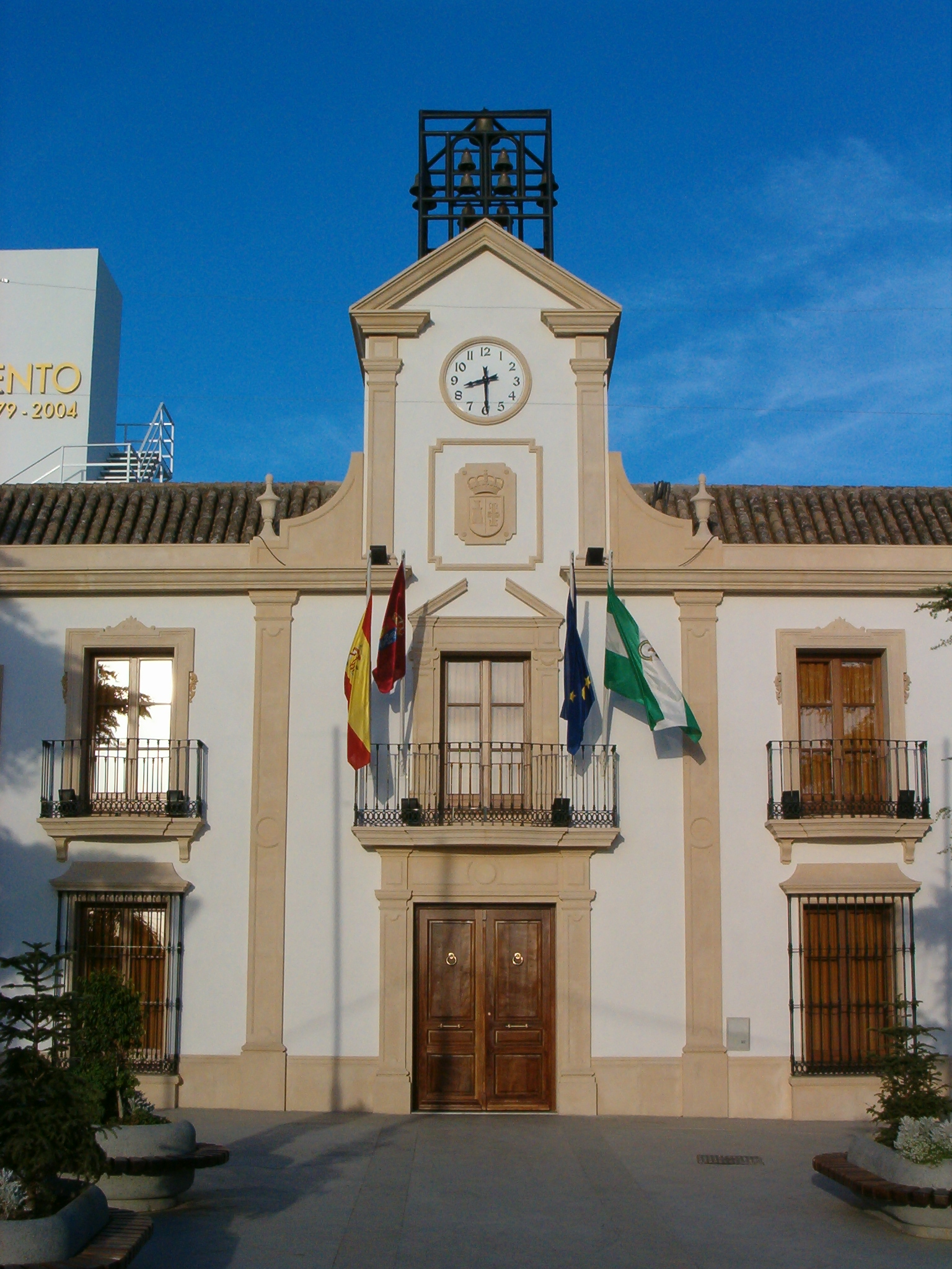 Ayuntamiento de Burguillos, provincia de Sevilla, España.